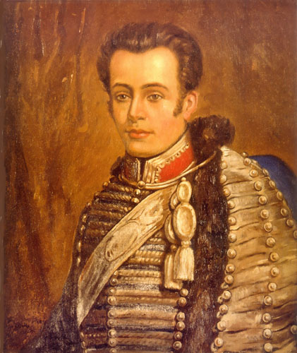 El héroe chileno José Miguel Carrera, retratado por el pintor Ezequiel Plaza